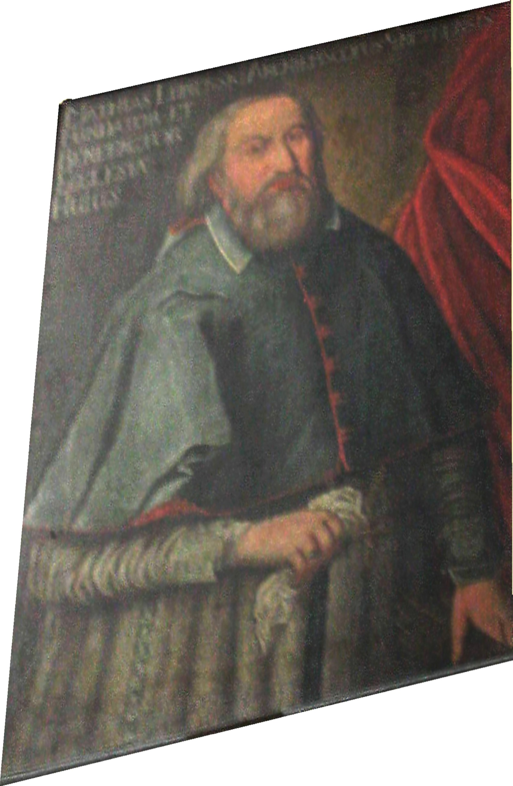 Maciej Łubieński primate of Poland anonymous painting before 1652 image taken by User:Mathiasrex Maciej Szczepańczyk